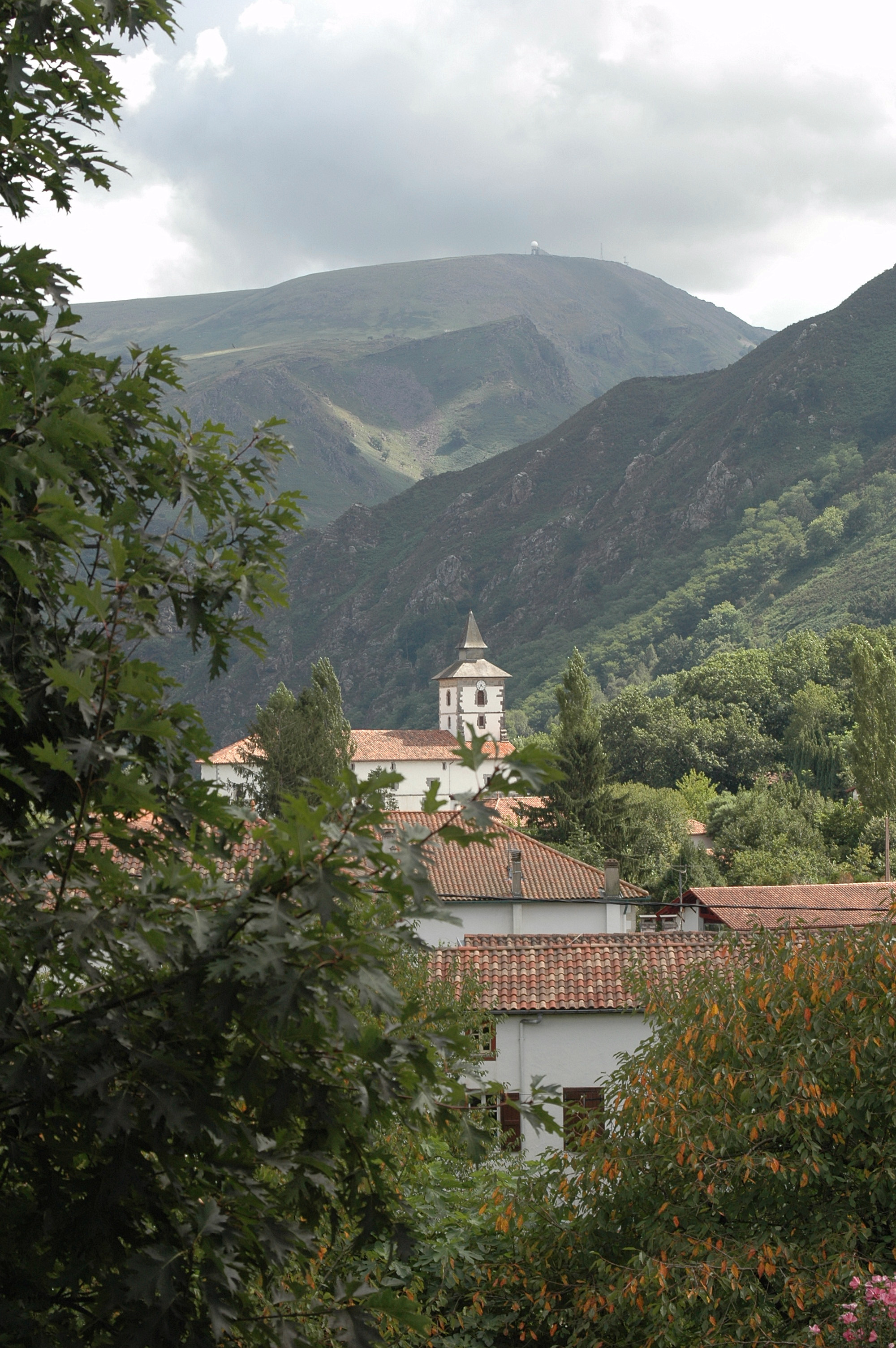 Itxassou, vue sur l'Artzamendi. Photo prise le 03/08/06 par Harrieta171